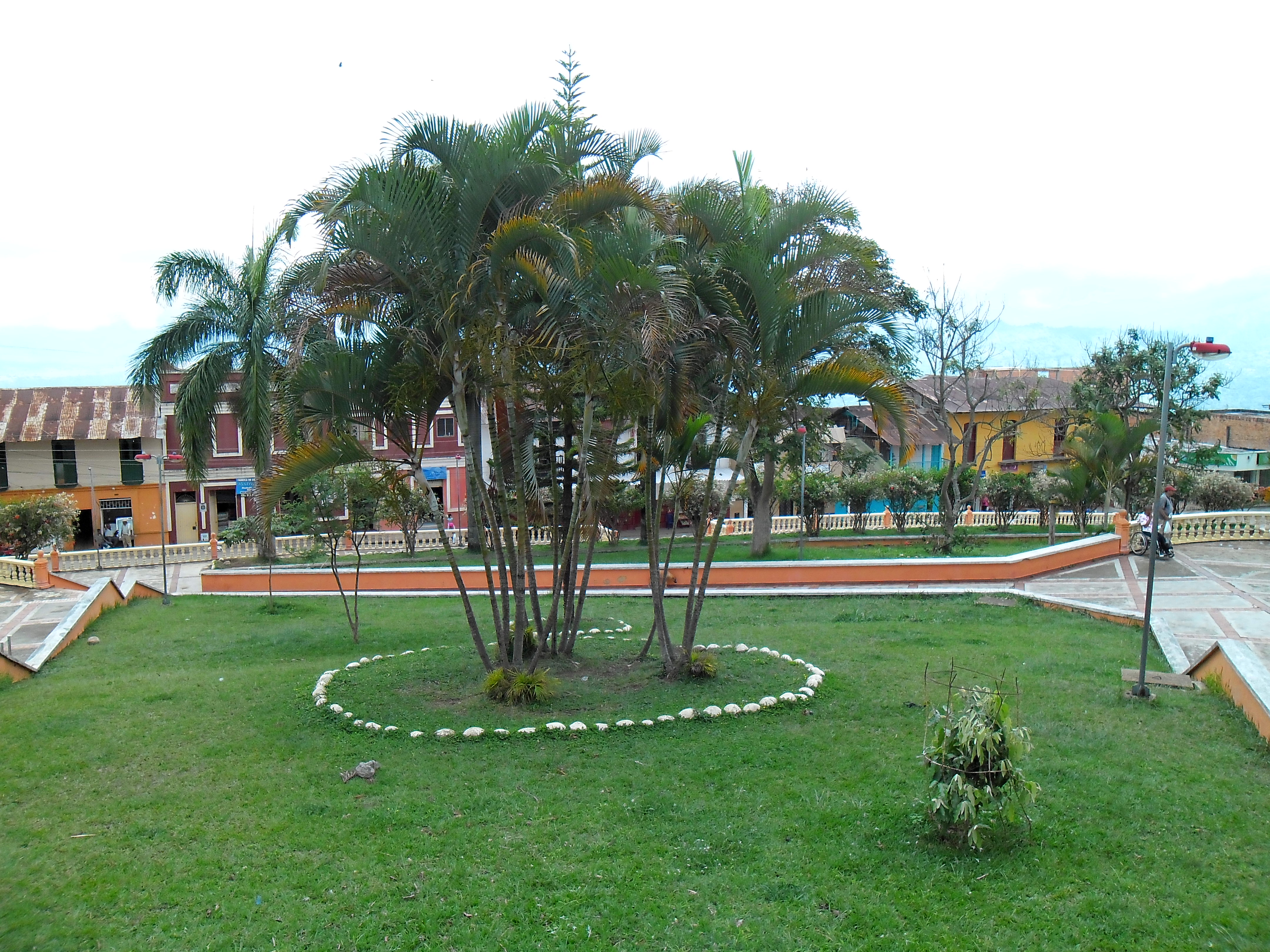 Parque Municipal Icononzo Tolima. Foto tomada por Robinson Estived Alarcón cortés